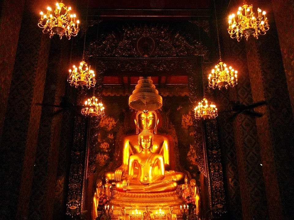 พระอุโบสถ วัดบวรนิเวศวิหารราชวรวิหาร เขตพระนคร กรุงเทพมหานคร ประดิษฐานพระประธานสำคัญ ได้แก่พระพุทธชินสีห์ และพระพุทธสุวรรณเขต